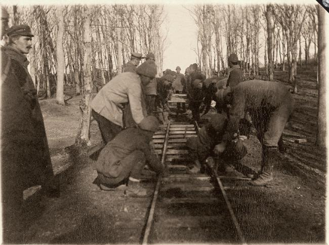 Haliç-Karadeniz Sahra Hattı'nın yapım süreci